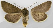 Lasionycta uniformis uniformis male